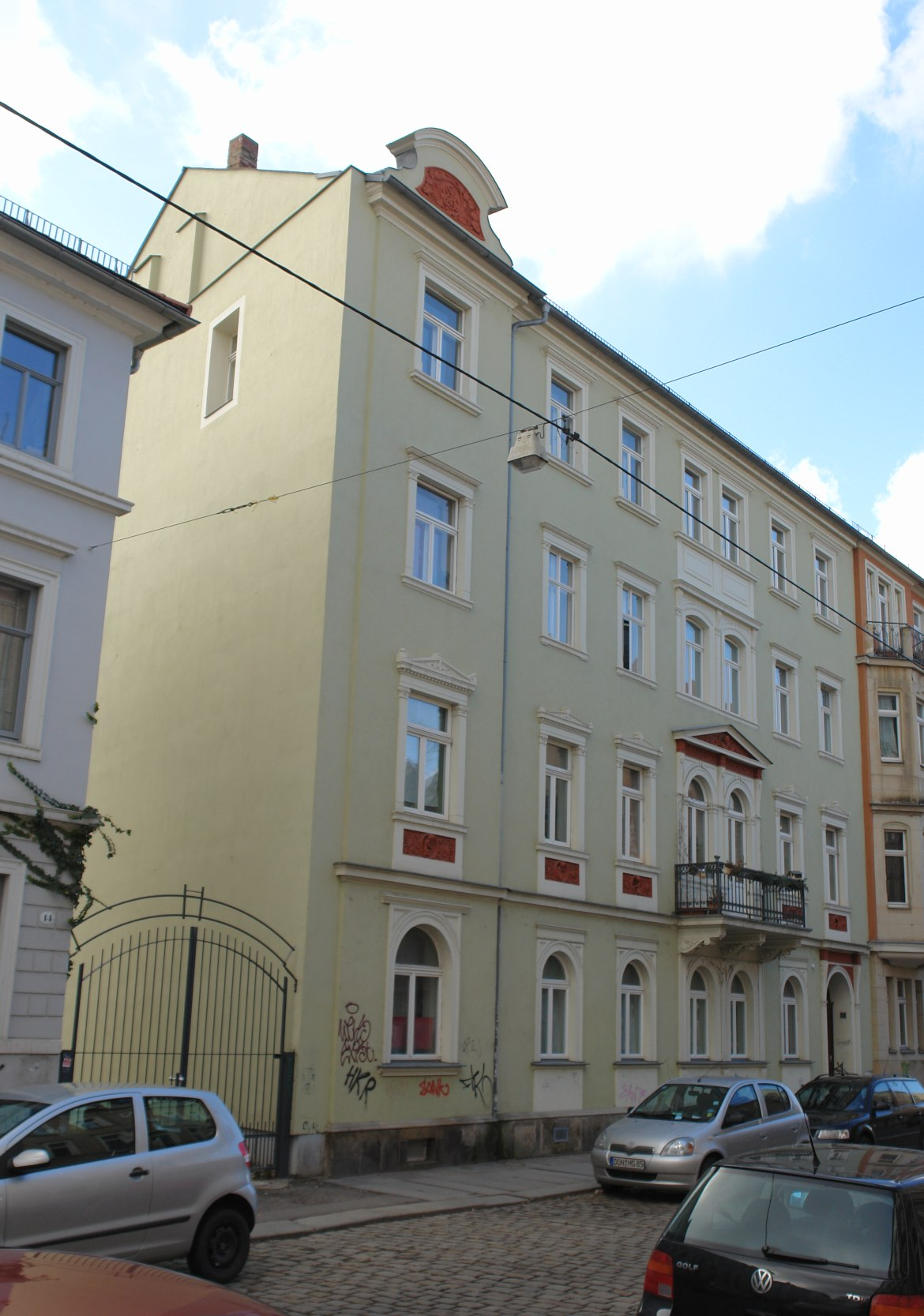 Dresden, Katharinenstraße 12